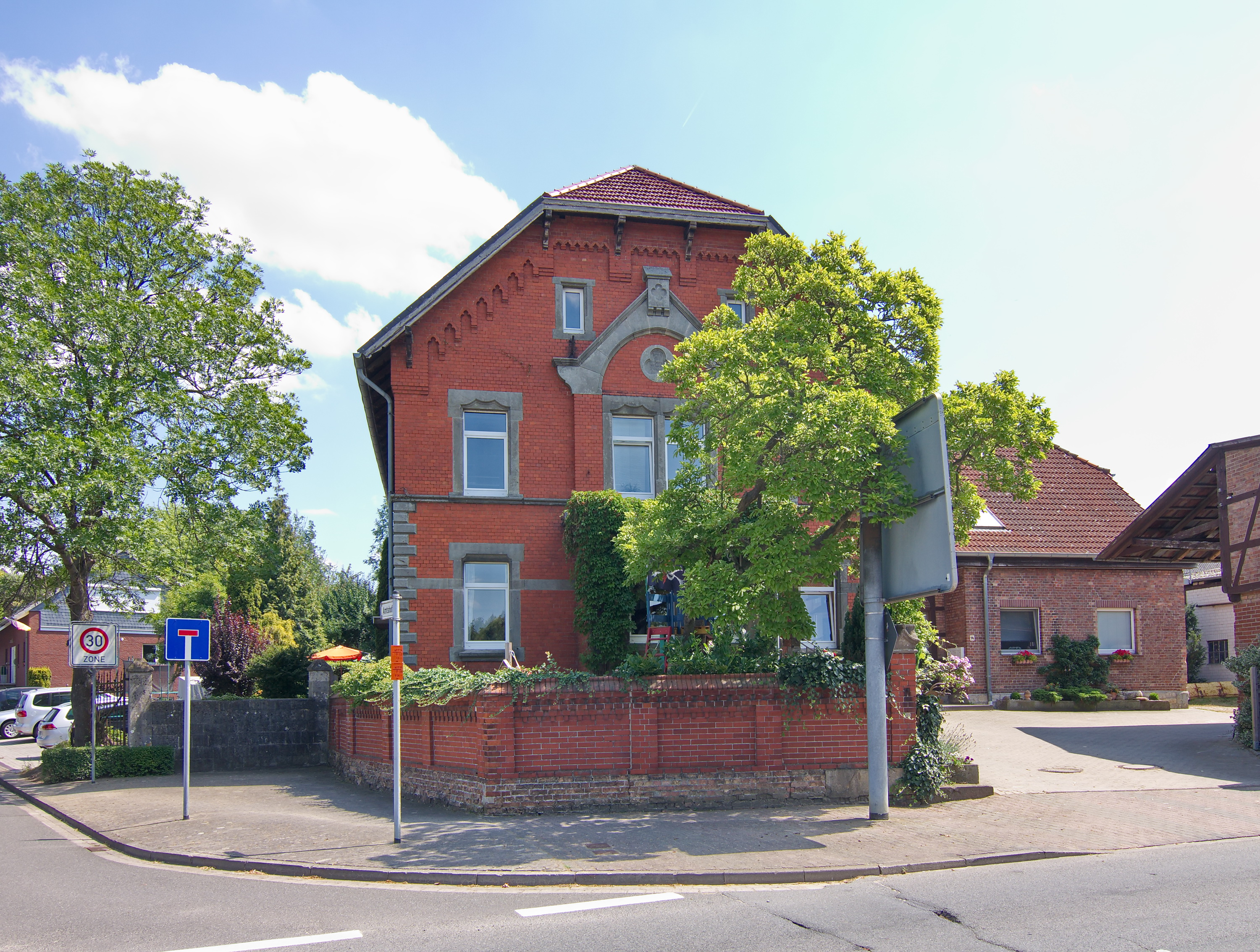 Ehmen (Wolfsburg), Niedersachsen, Deutschland